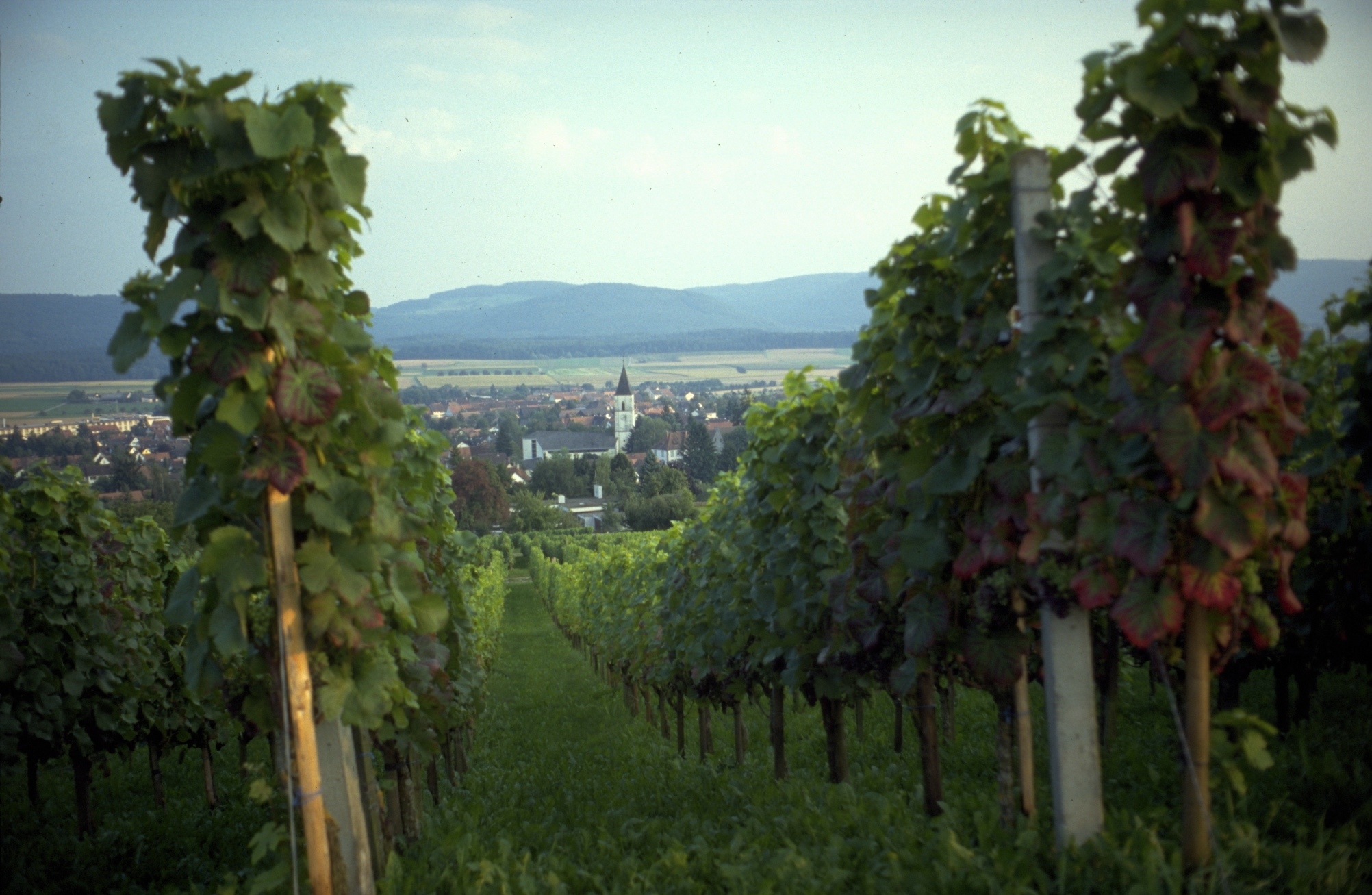 Blick vom Rebberg auf Erzingen, Klettgau (Gemeinde), Landkreis Waldshut, Baden-Württemberg.